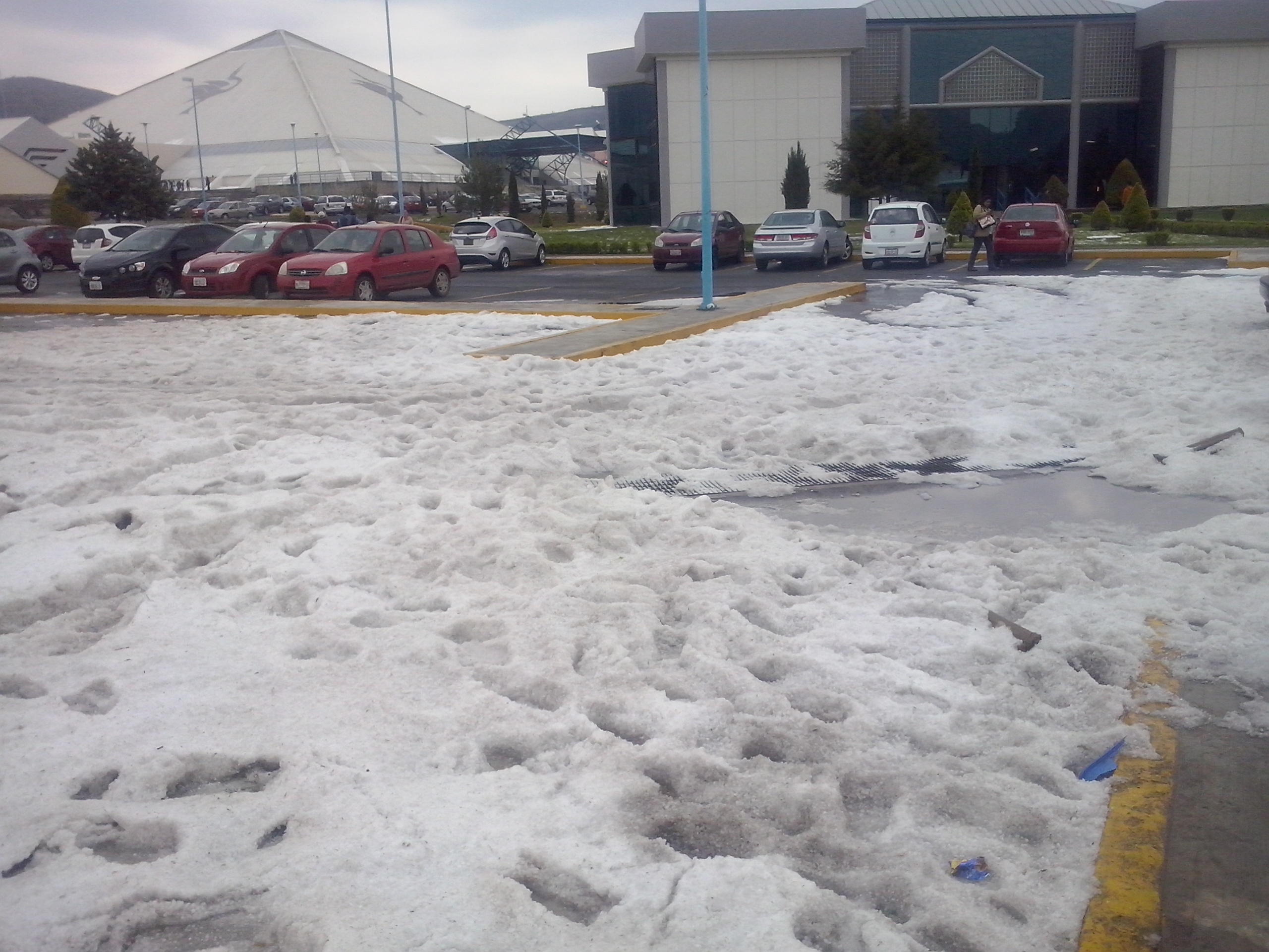 Granizada en la Ciudad Universitaria de la UAEH en Mineral de la Reforma, Hidalgo en Méxic